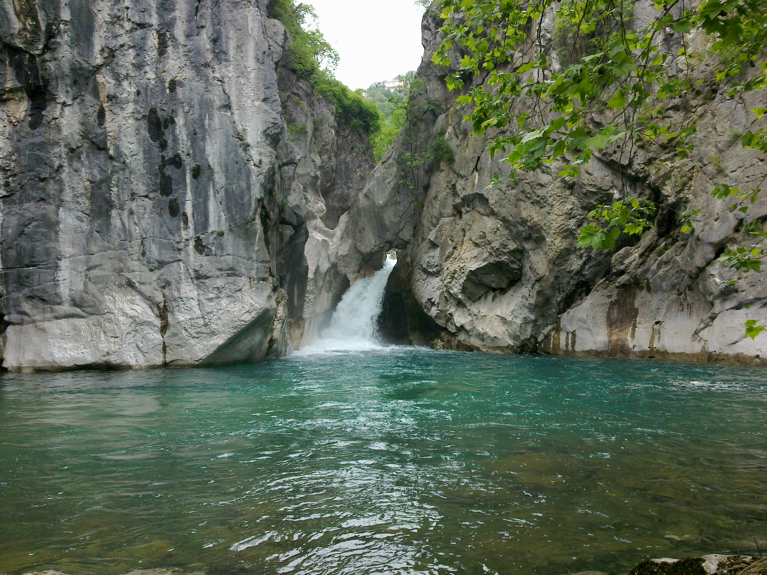 riječina